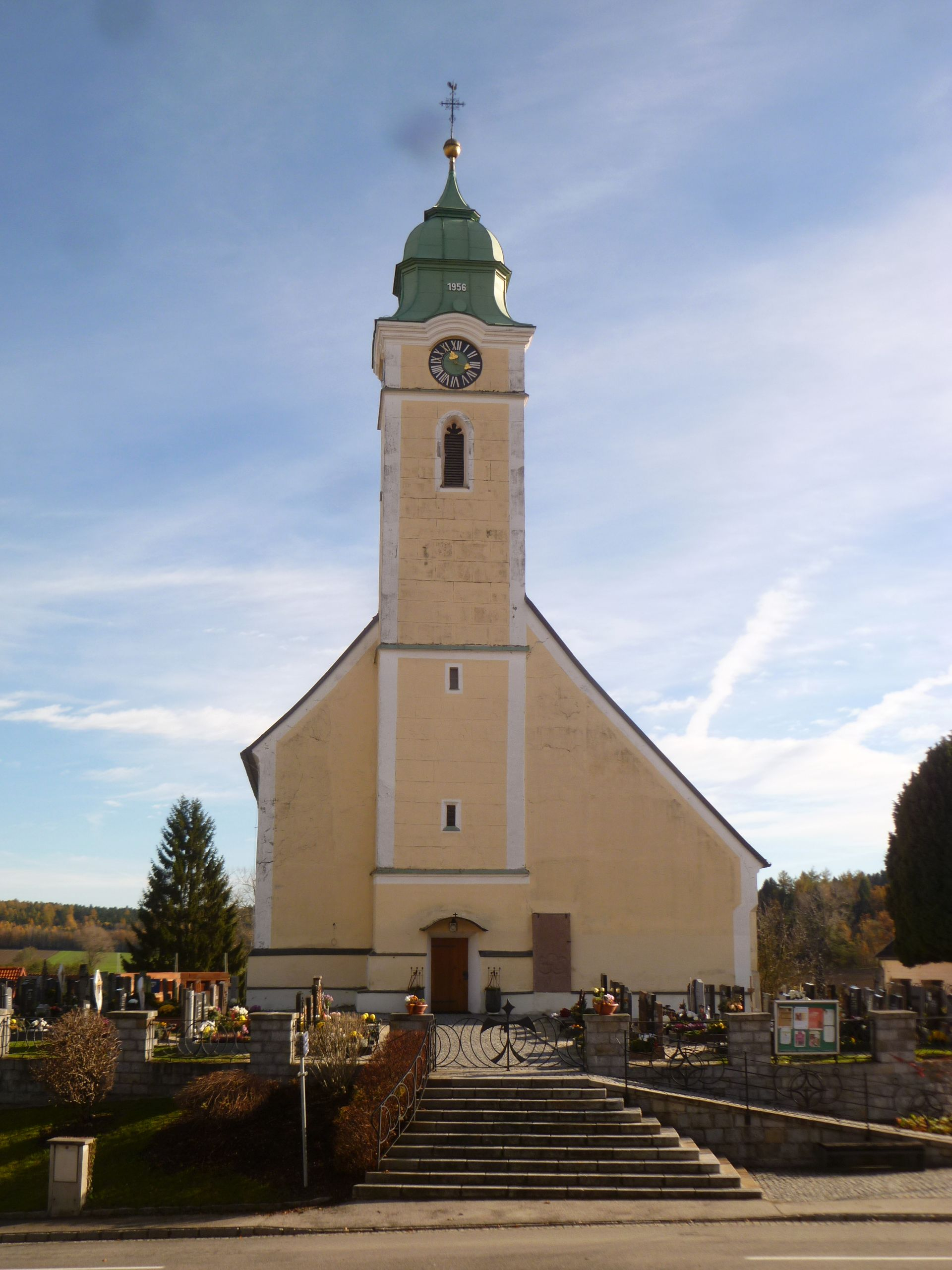 Kath. Pfarrkirche Mariä Himmelfahrt und Friedhof